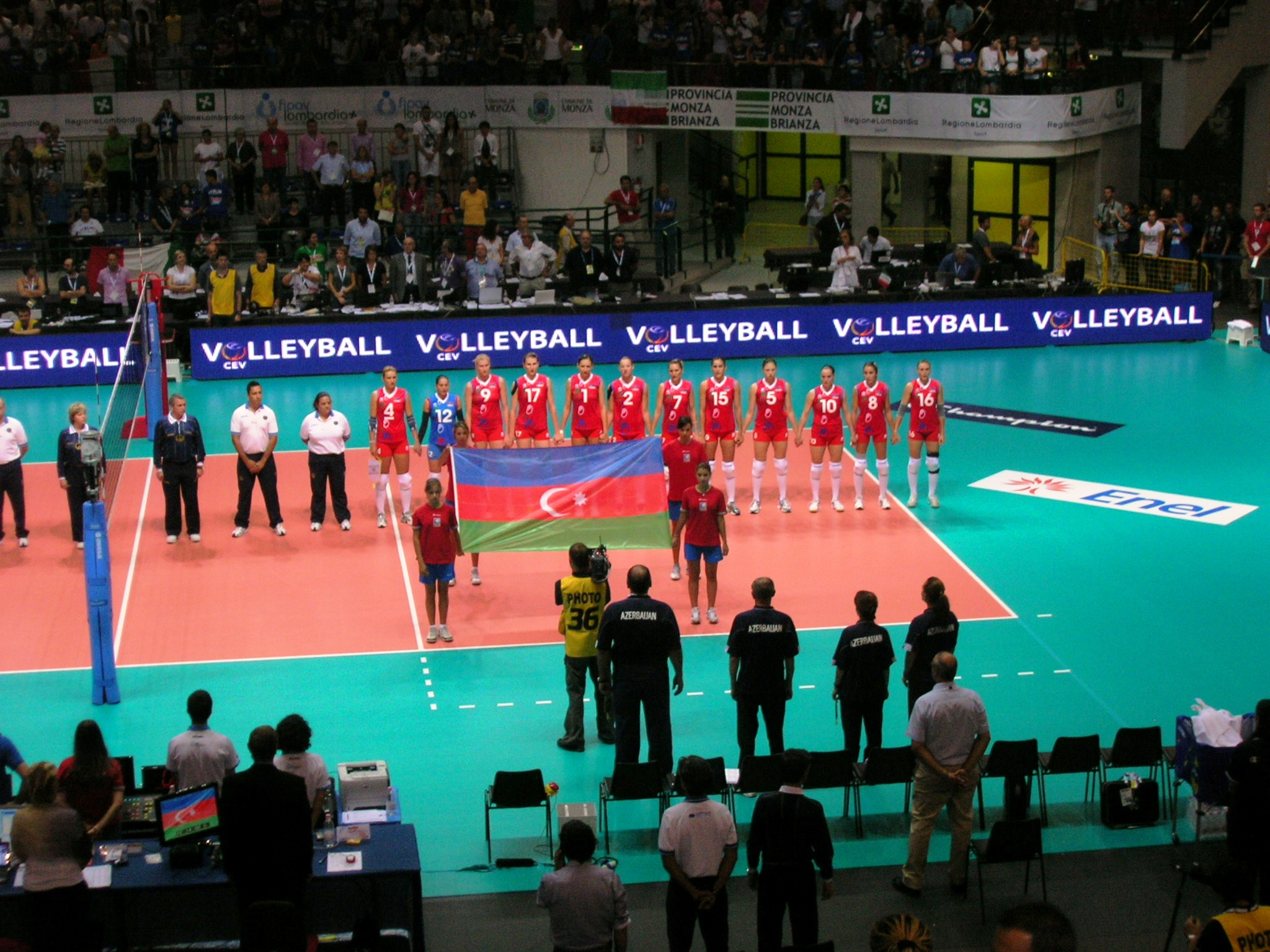 Partita: Italia - Azerbaigian 3-1